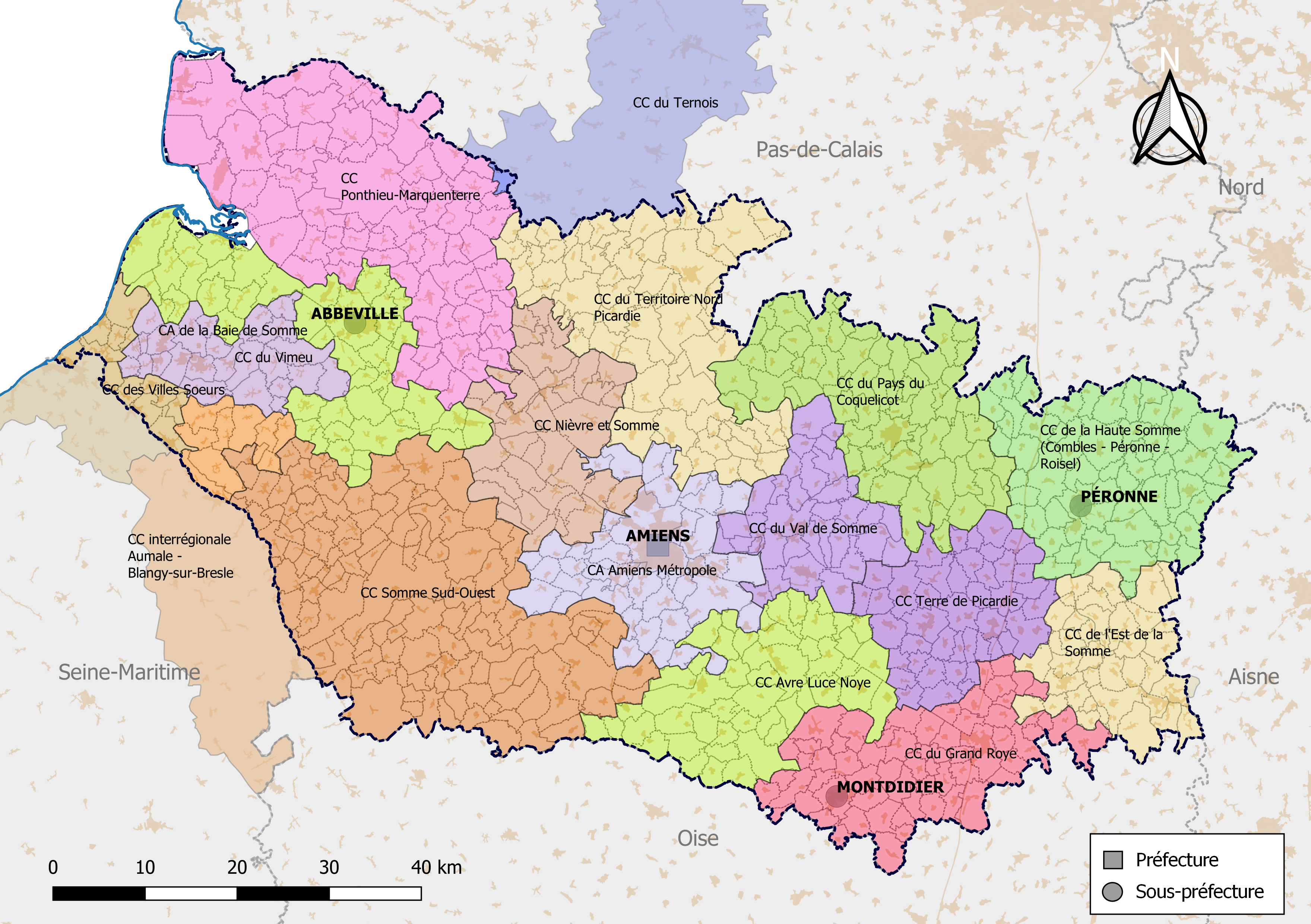 Carte des intercommunalités du département de la Somme, France. Composition au 1er janvier 2019.